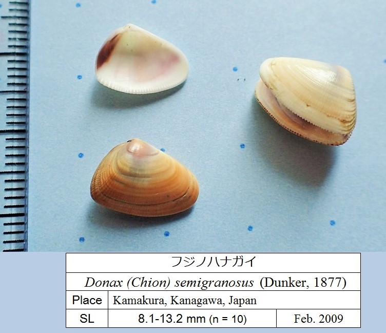 フジノハナガイ, 鎌倉由比ヶ浜, 2009年